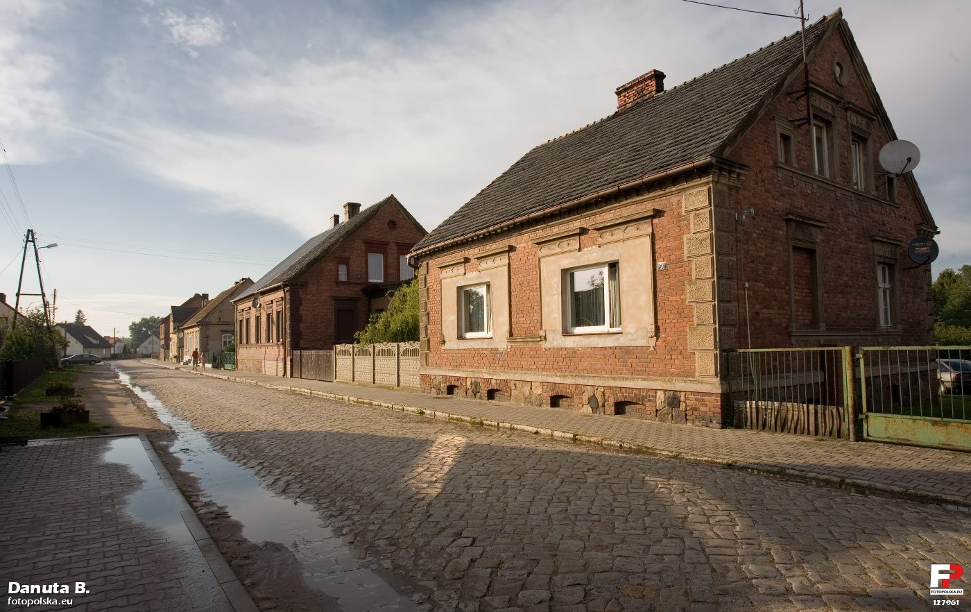 Zabudowania Jordanowa.